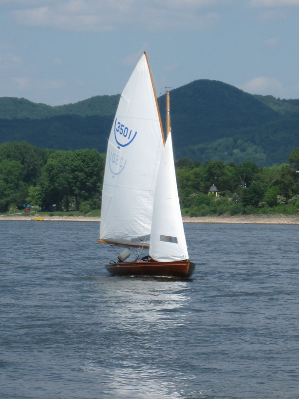 Eine Zestienkwadraat (BM 16m²) auf dem Rhein.